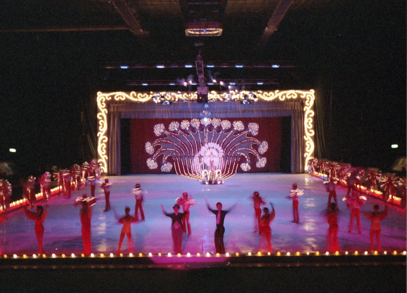 Holiday on Ice på "Hovet" den 4 april 1986